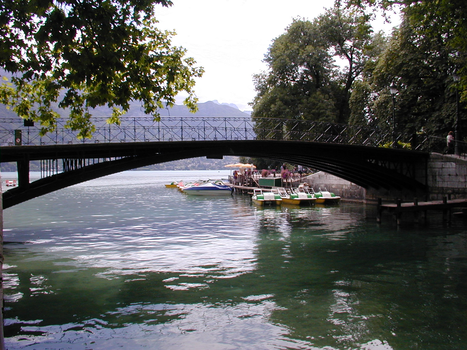 Annecy - Le Pont des Amours - juin 2003 Photographie du "Pont des Amours" prise par Utilisateur:Semnoz à Annecy en Haute-Savoie (France) en juin 2003, et placée dans le domaine public. "Pont des Amours" at Annecy, Haute-Savoie, France. Taken by wiki-french-user Semnoz in June 2003 and placed in the public domain. Image:0306 Annecy - Pont des Amours.jpg